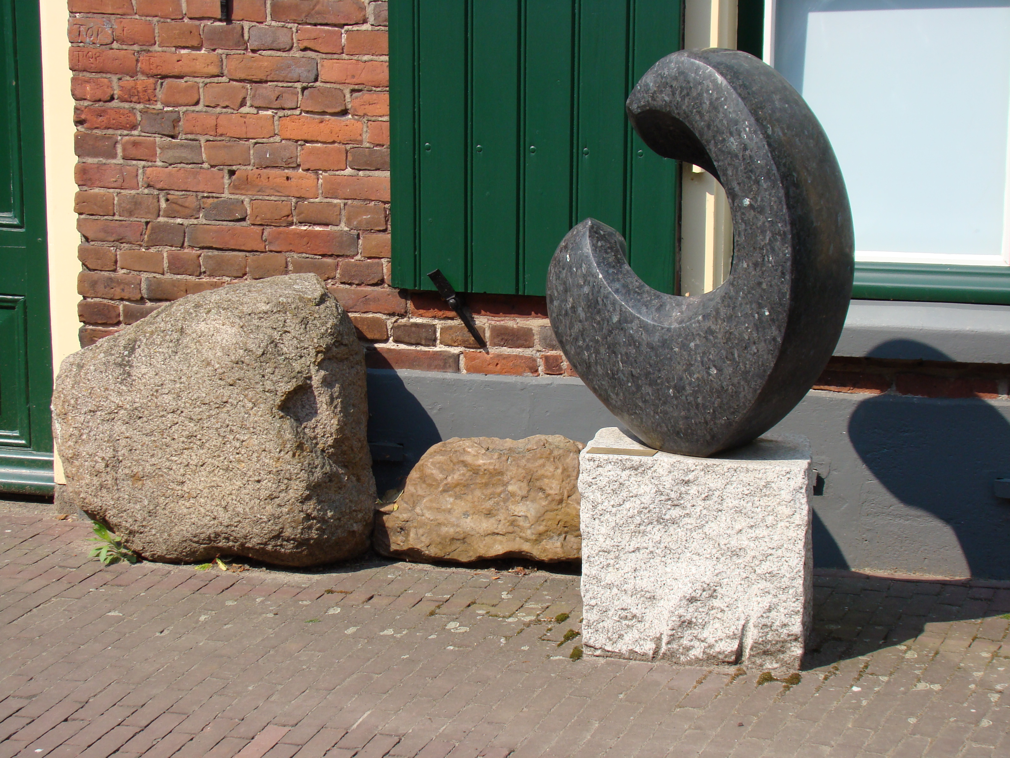 Sculpture in Bredevoort by Thorvald Dudok van Heel